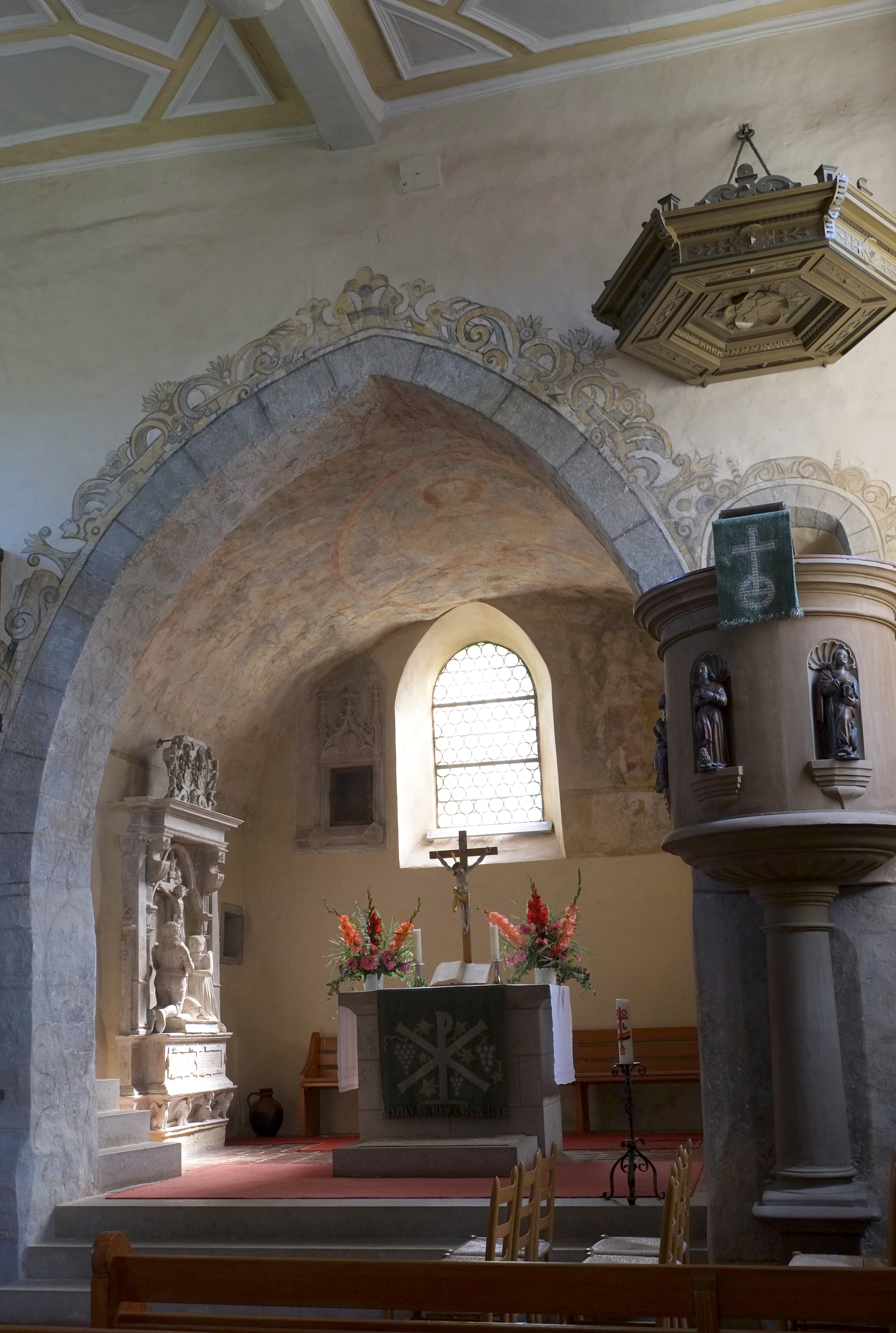 Evangelische Marienkirche in Kocherstetten, einem Stadtteil von Künzelsau im Hohenlohekreis (Baden-Württemberg, Deutschland)